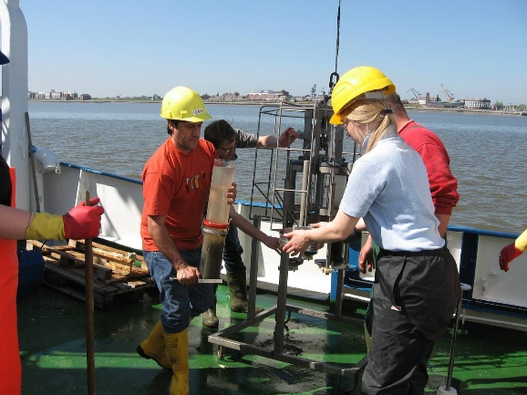 Wissenschaftlerinnen und Wissenschaftler auf dem Senckenberg Forschungskutter in der Nordsee Foto: Senckenberg